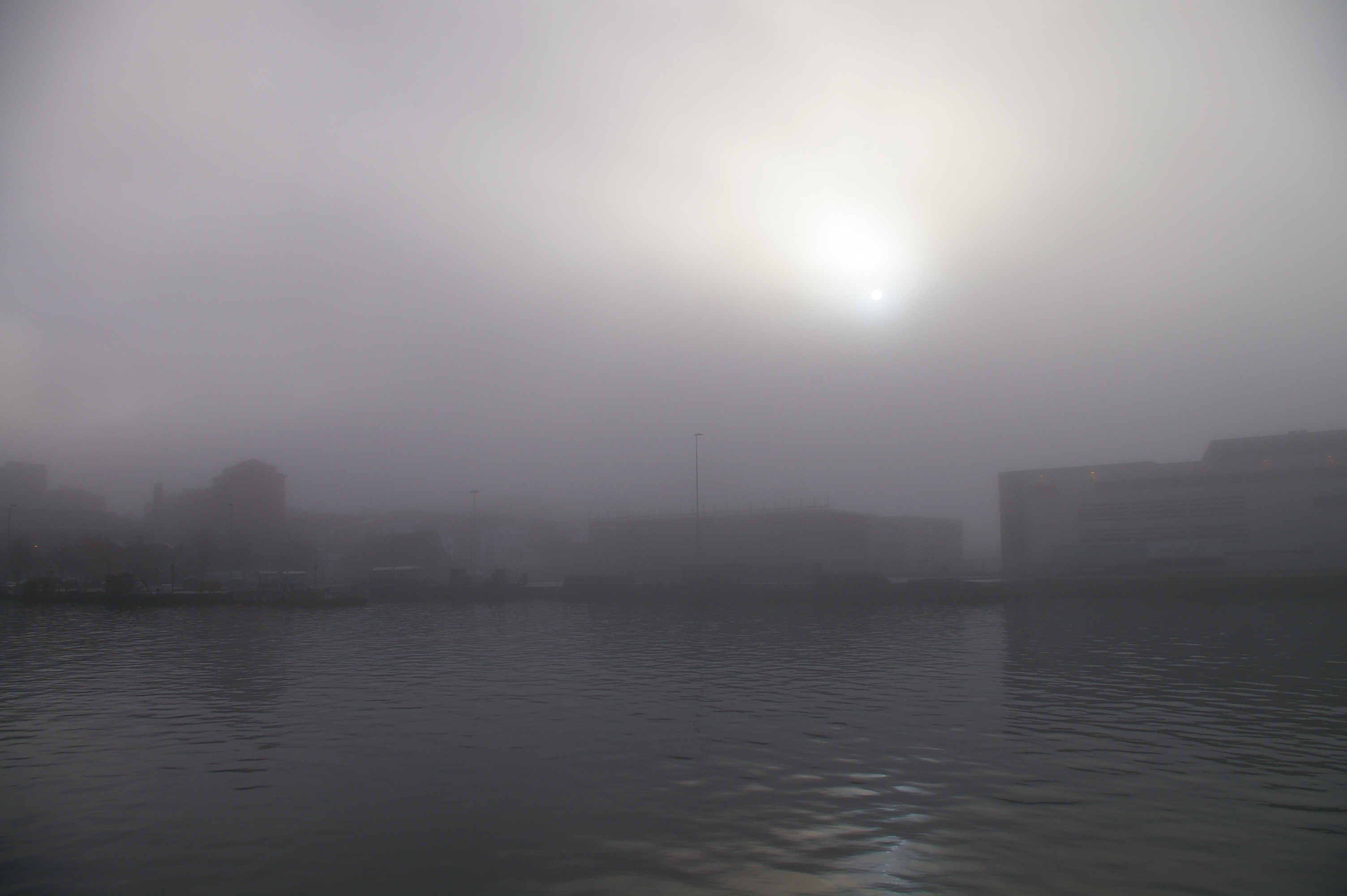 Fog in Bergen, Nøstet.